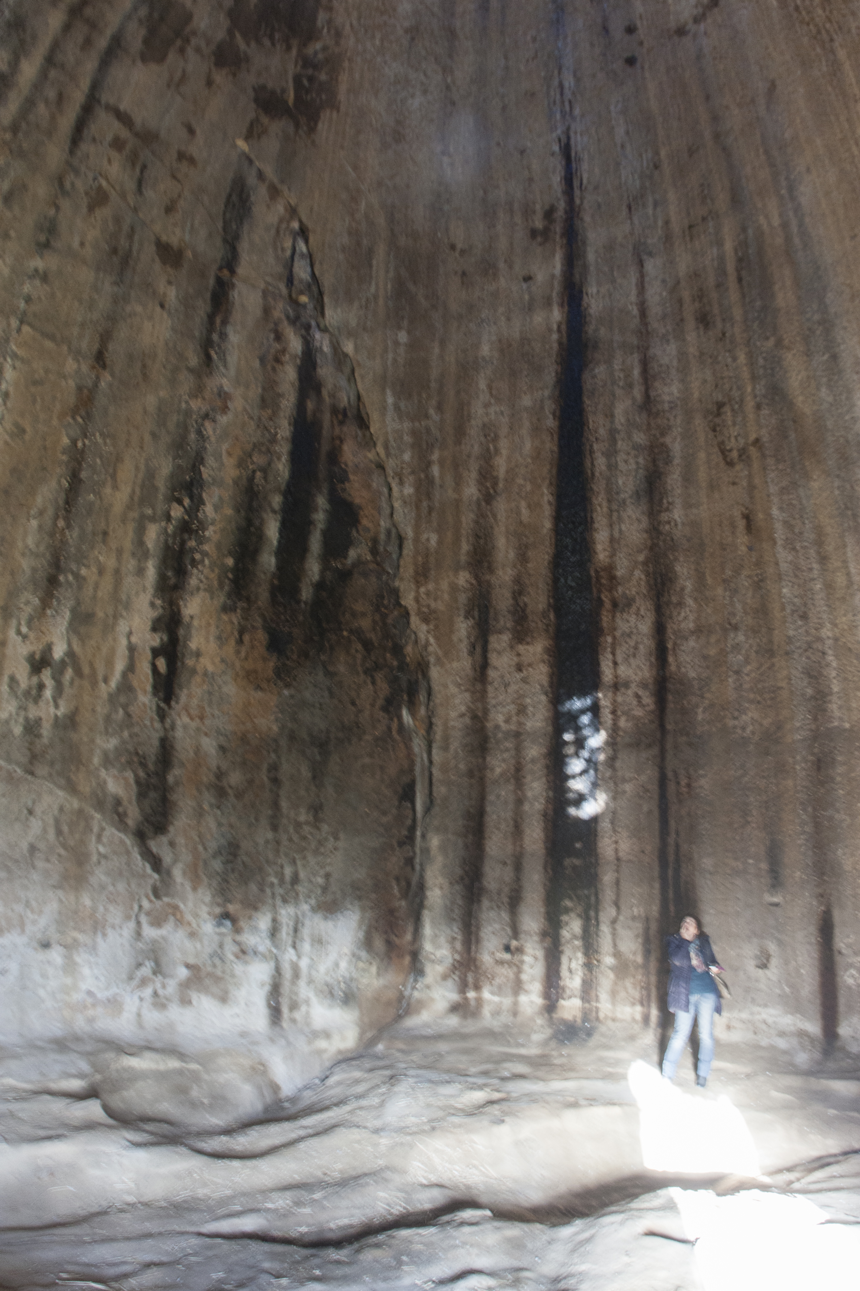 Grotte Gurfa